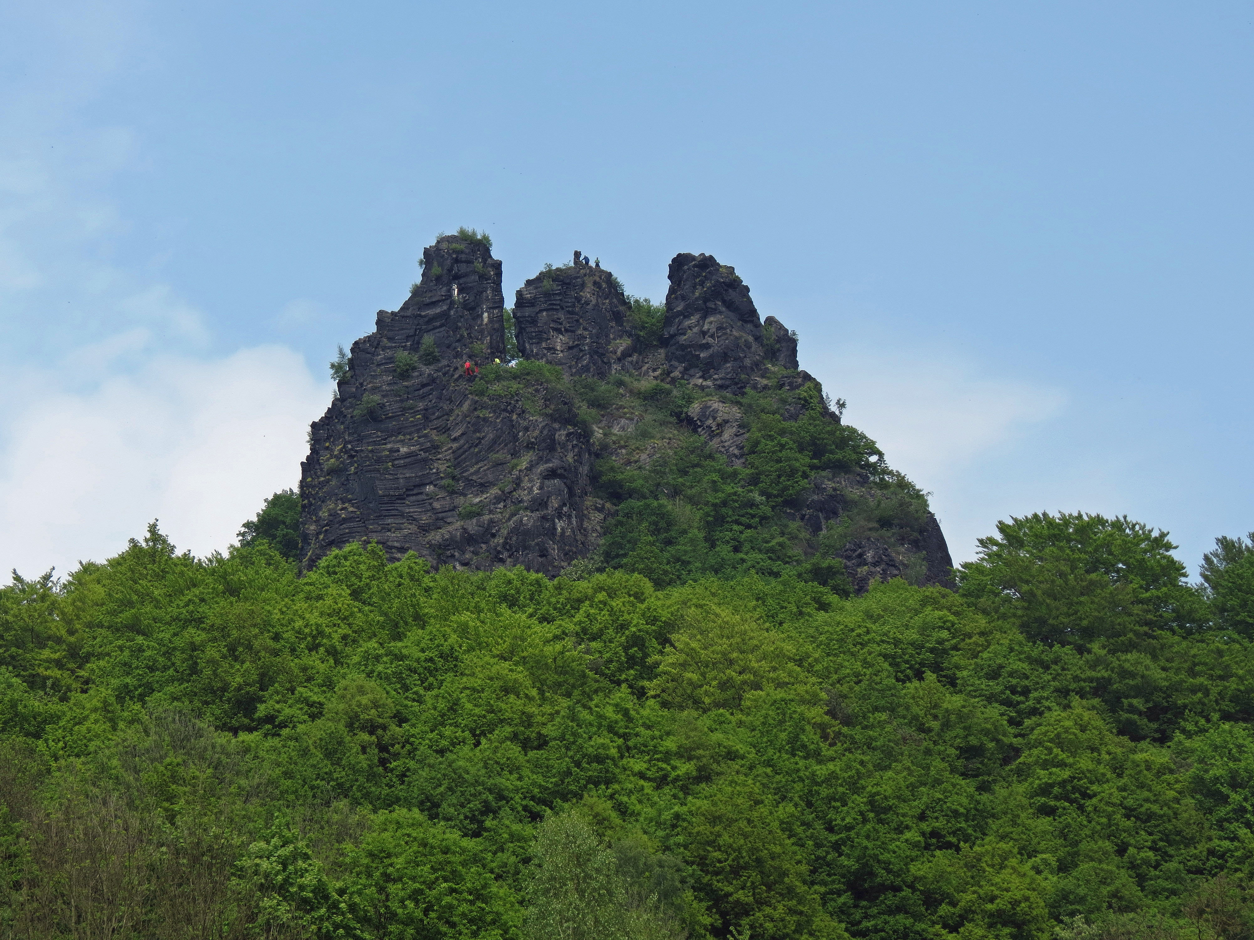 PR Vrabinec